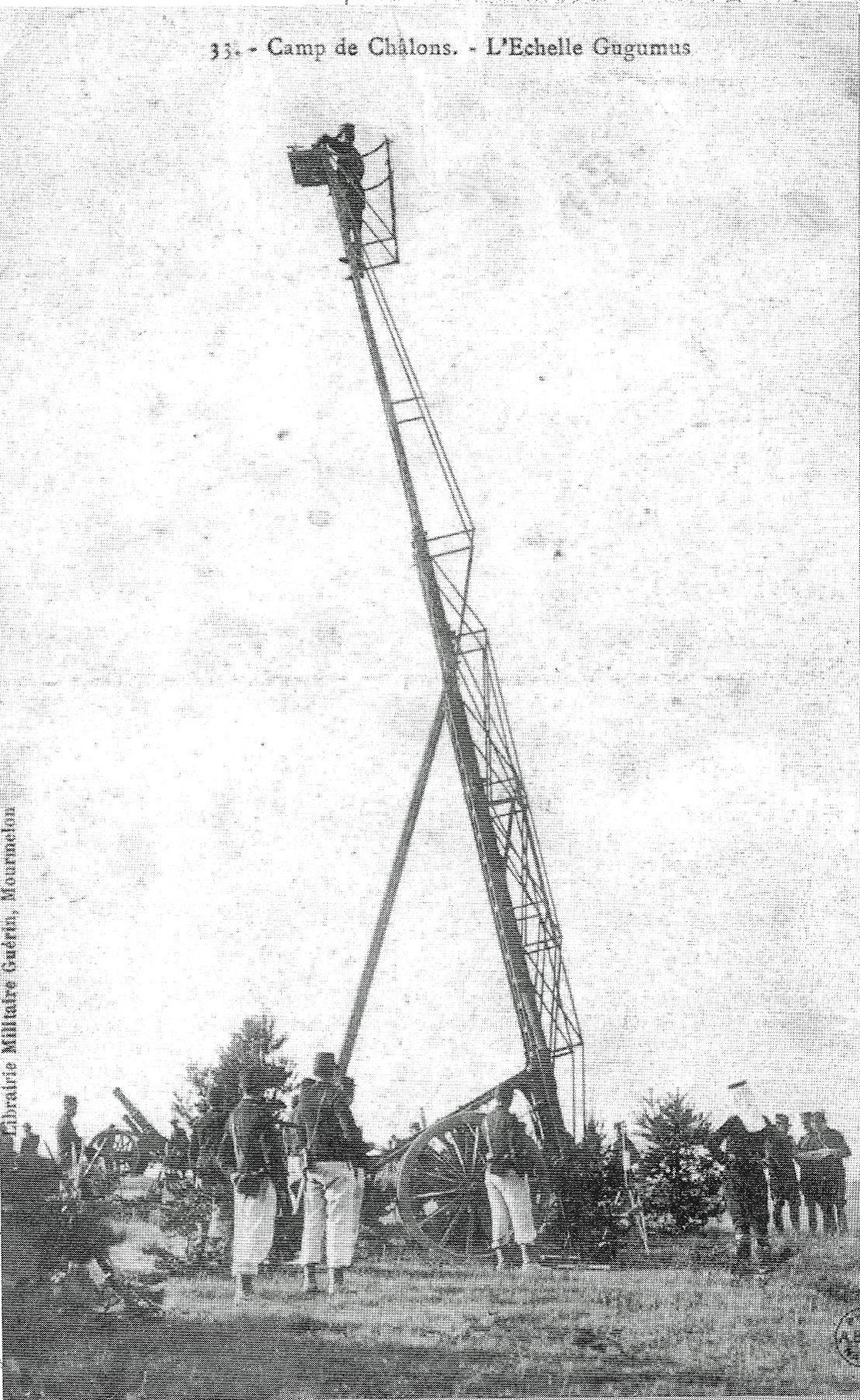 Utilisation d'une échelle Gugumus pour le repérage de l'artillerie au camp de Châlons.